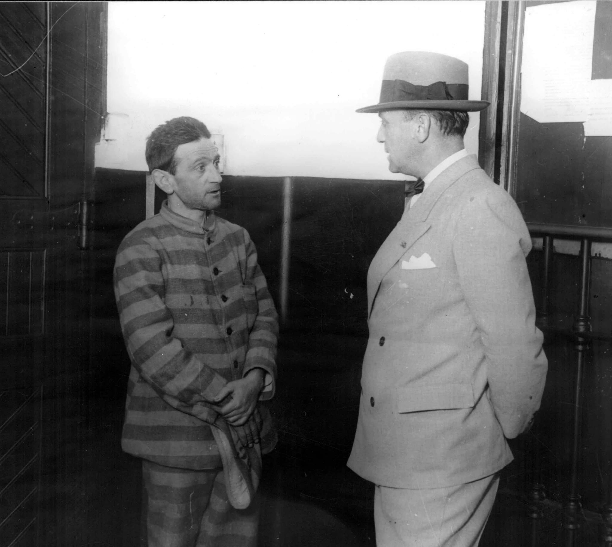 Cayetano Santos Godino alias "Petiso Orejudo" en el penal de Tierra del Fuego, luego de ser capturado en Buenos Aires en 1912.